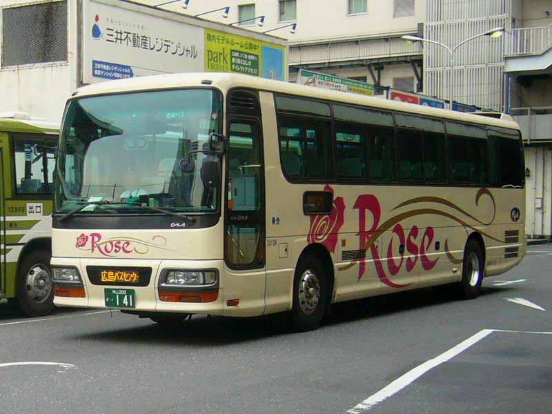 登録番号：福山200か・141 中国バス所属 ローズライナー号用 いすゞ・ガーラ KL-LV781R2